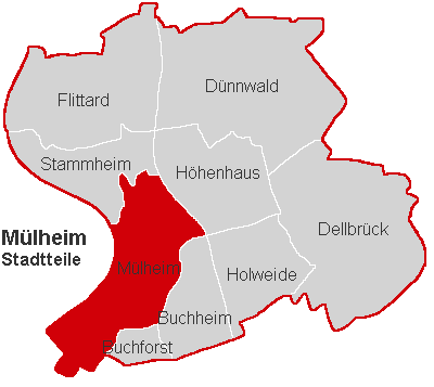 Lagekarte Mülheim im Stadtbezirk Köln-Mülheim